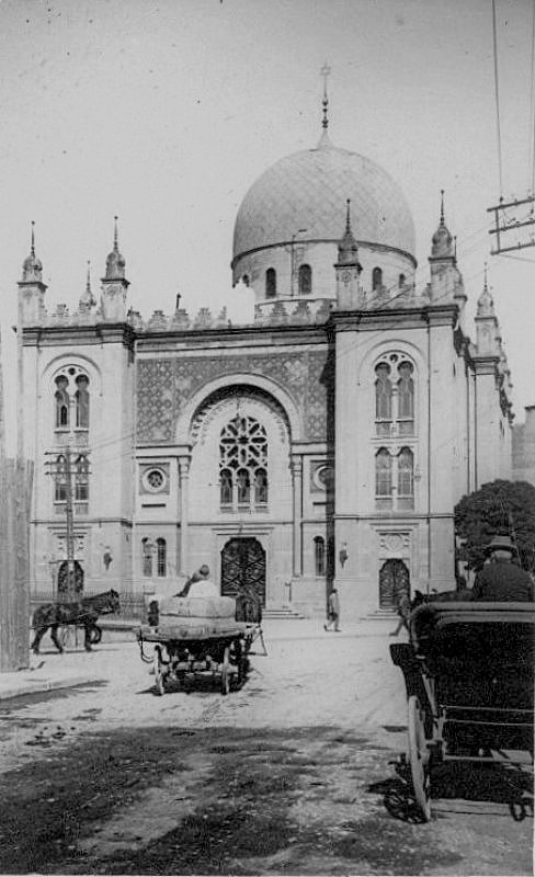 Synagoga w Czerniowicach